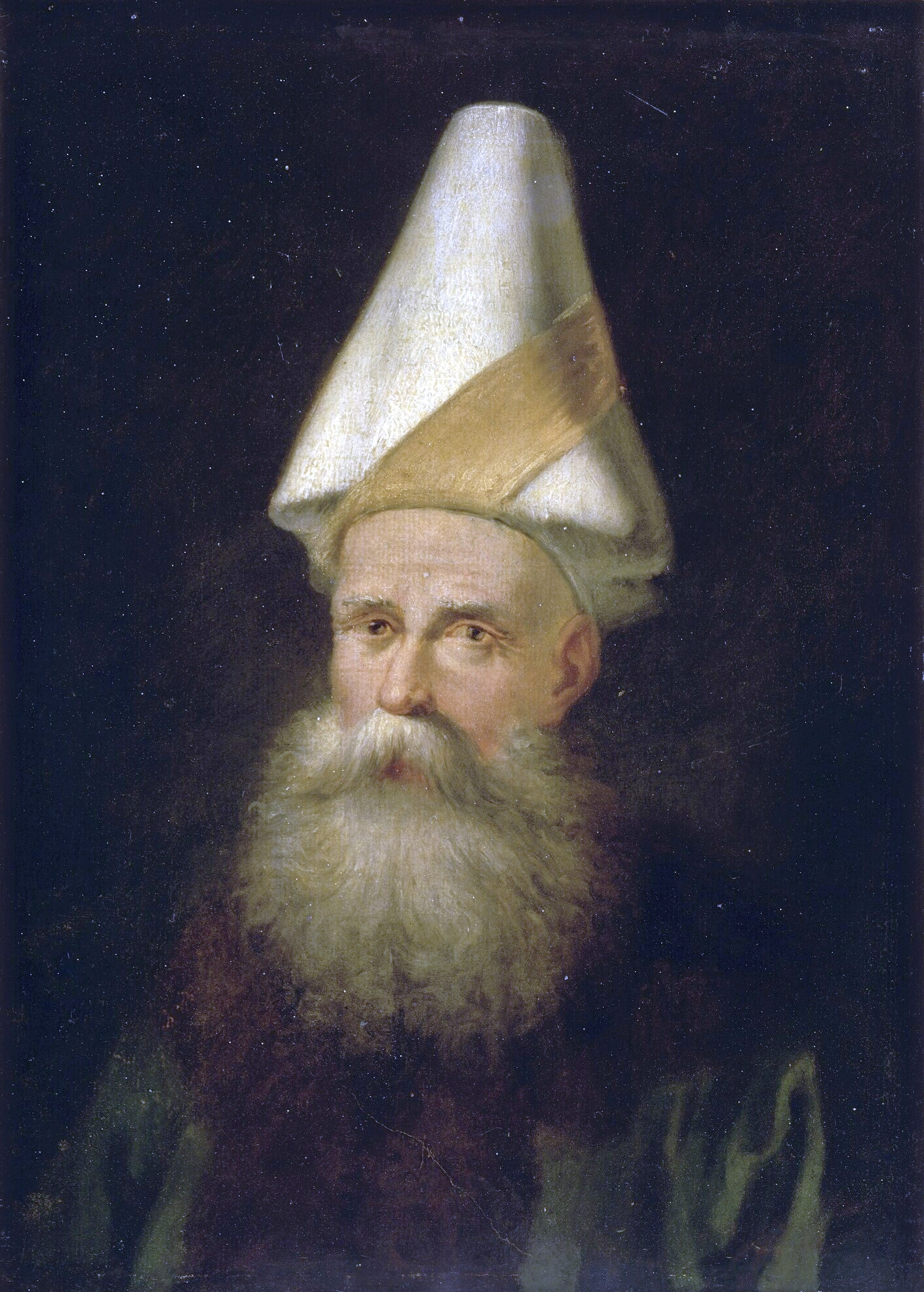 Youssouf Pacha, grand vizir. Nom exact : Koca Yusuf Pasha. Dimensions : 37,5 x 27,7 cm ; cadre : 41,8 x 31,8 x 3 cm. Matière et technique : huile sur toile.